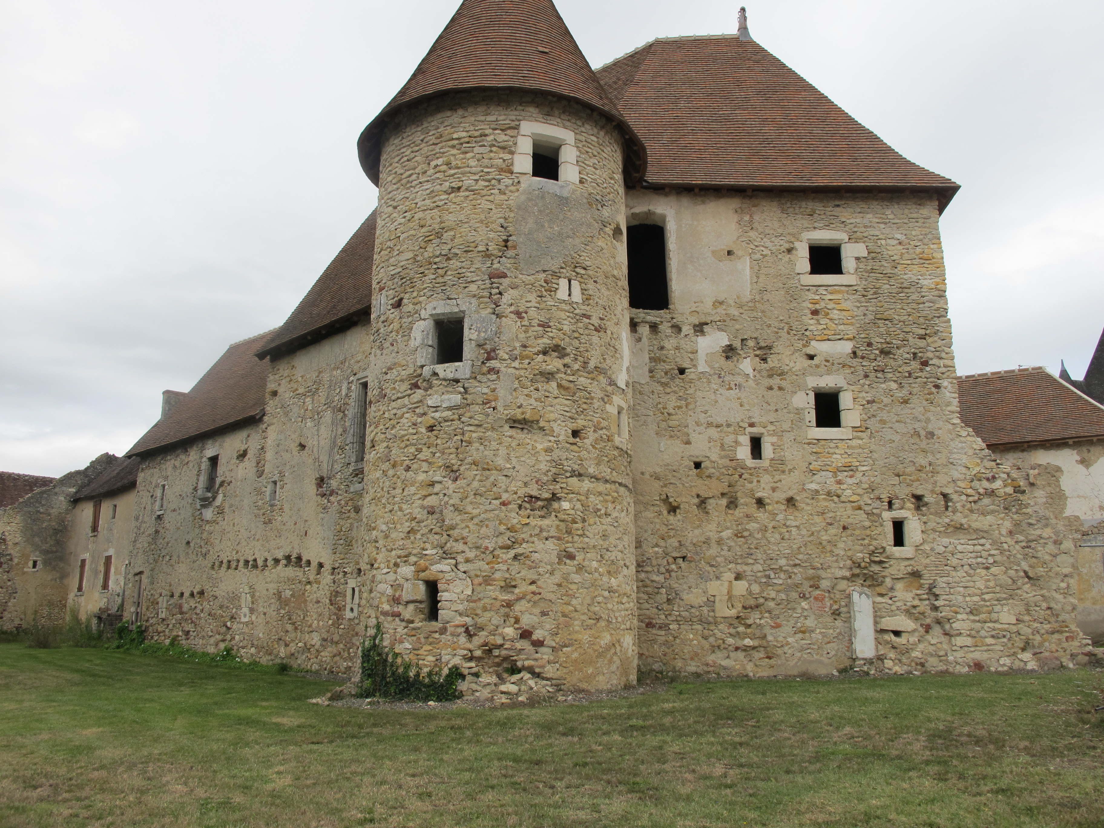 Abbaye de Méobecq, France